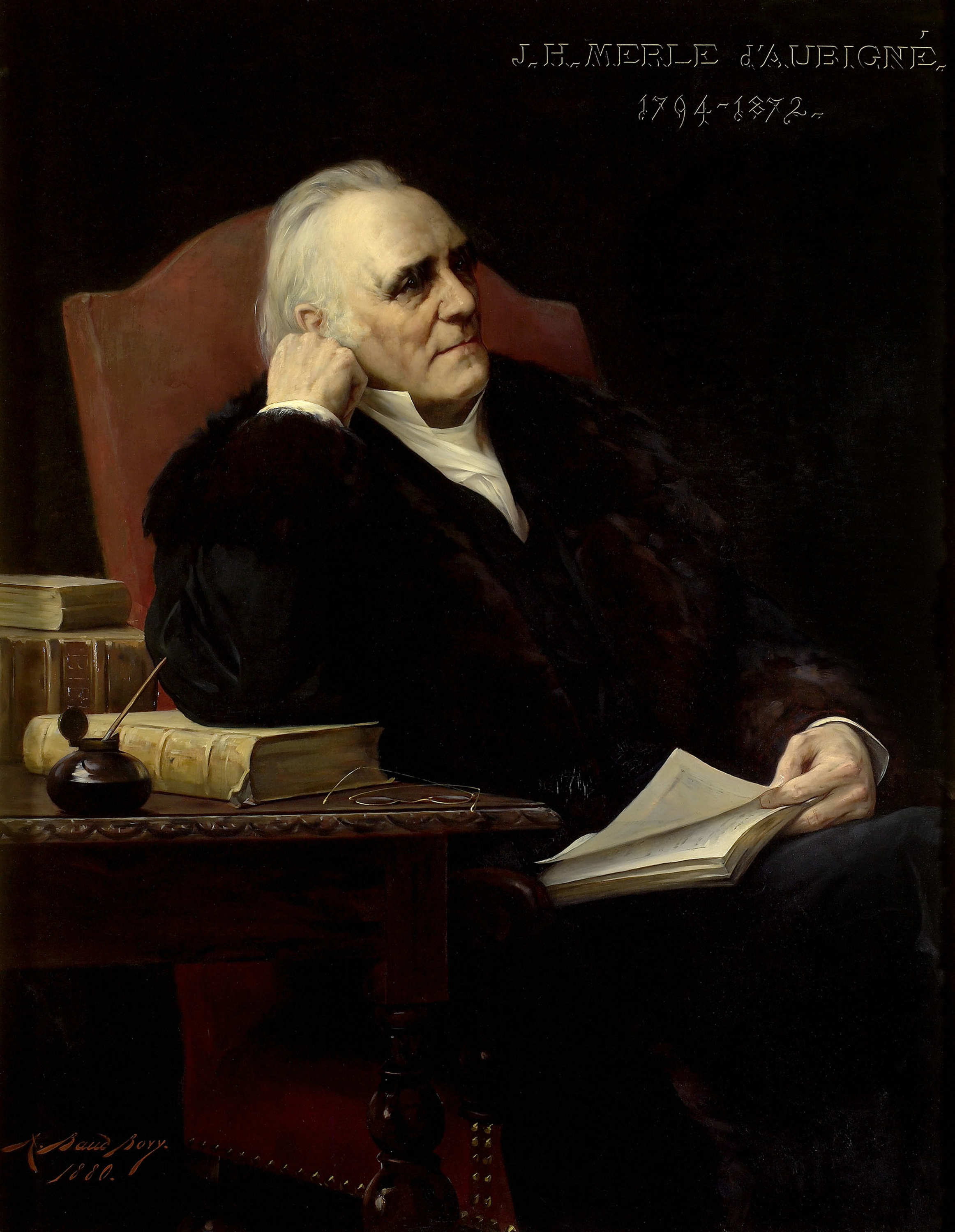 Jean-Henri Merle d'Aubigné (1794-1872)